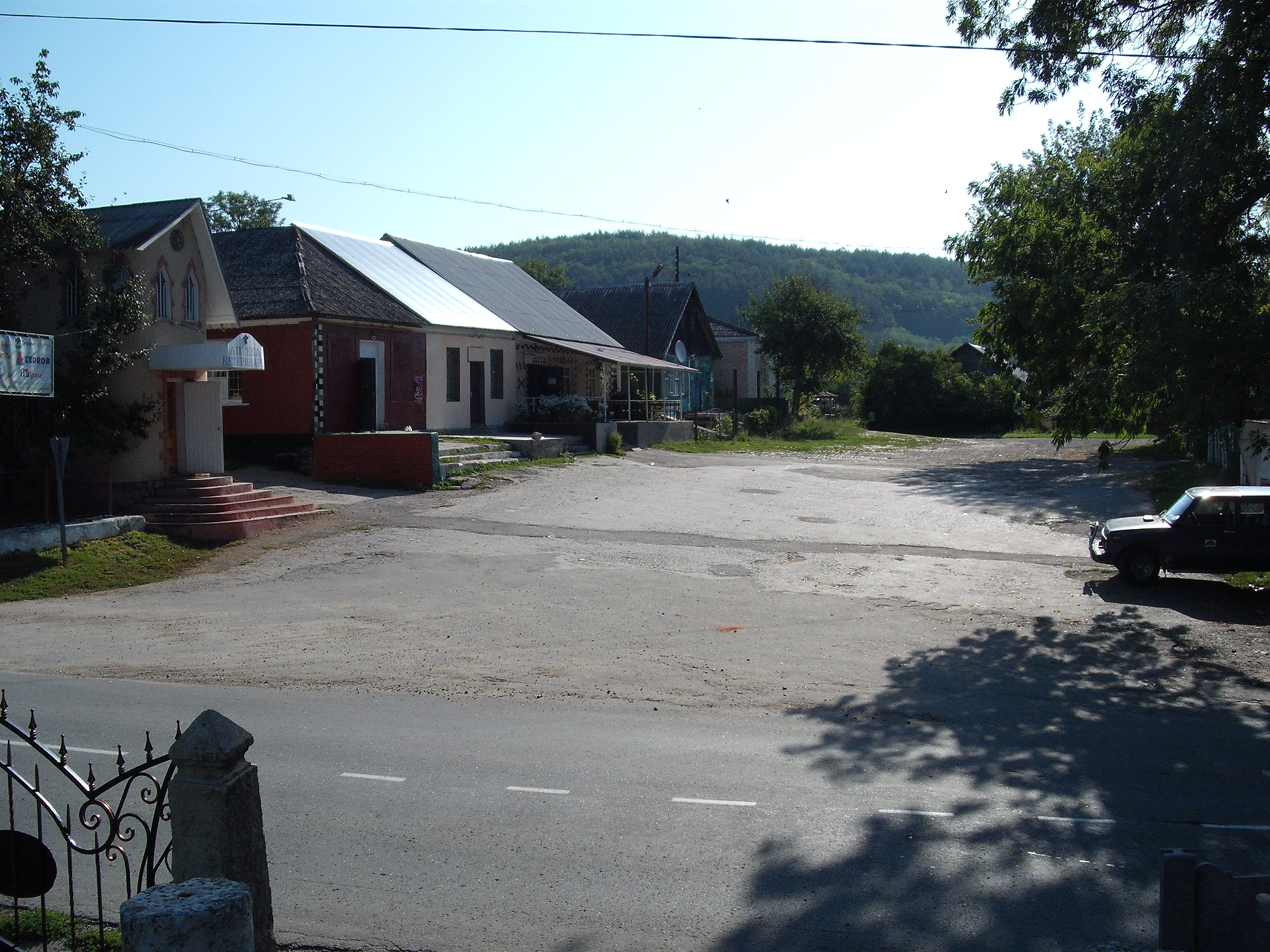 Wieś Mińkowce, centrum wsi